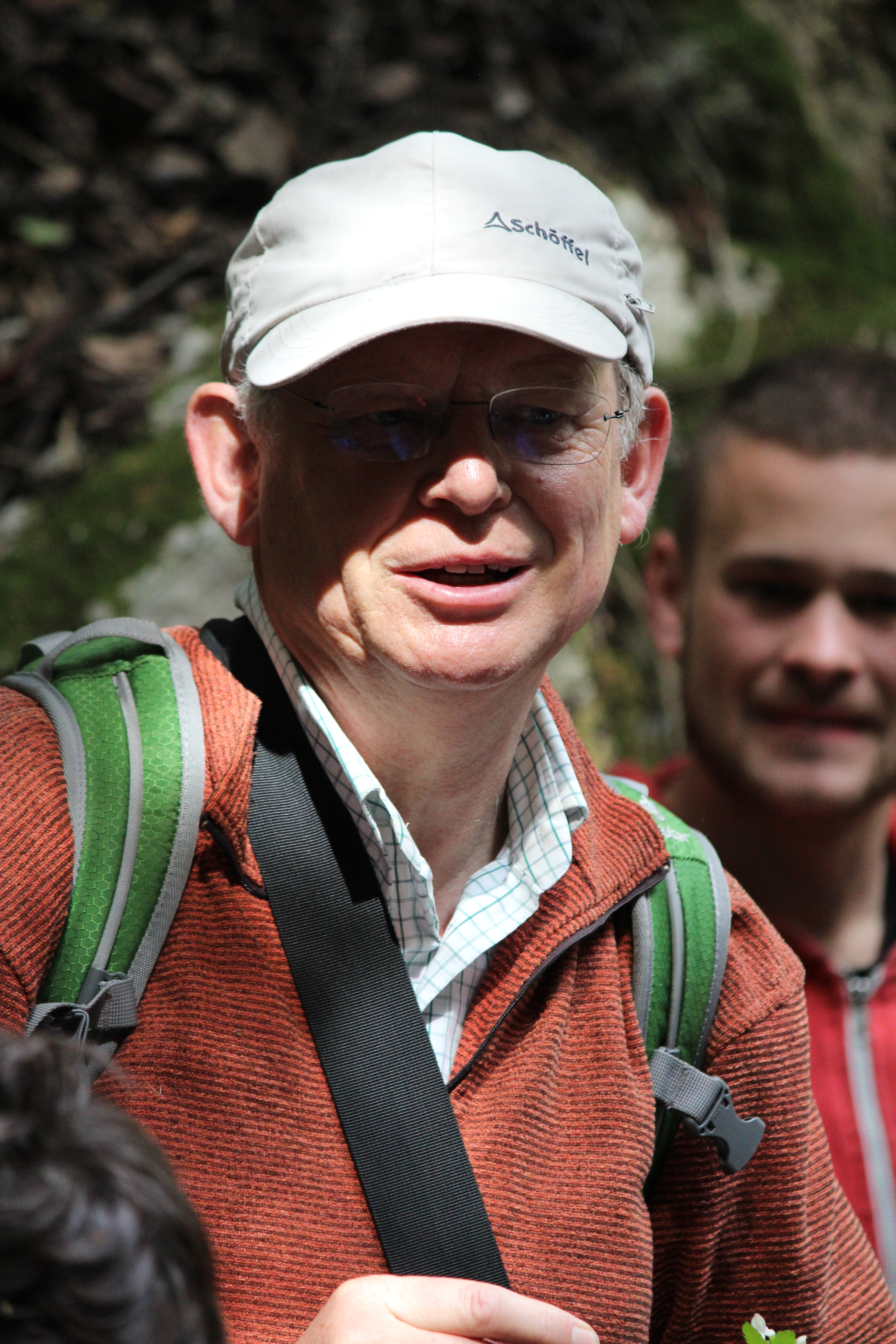 Prof. Jürg Stöcklin auf einer geobotanischen Exkursion für Studierende der Universität Basel (Samos 2014)